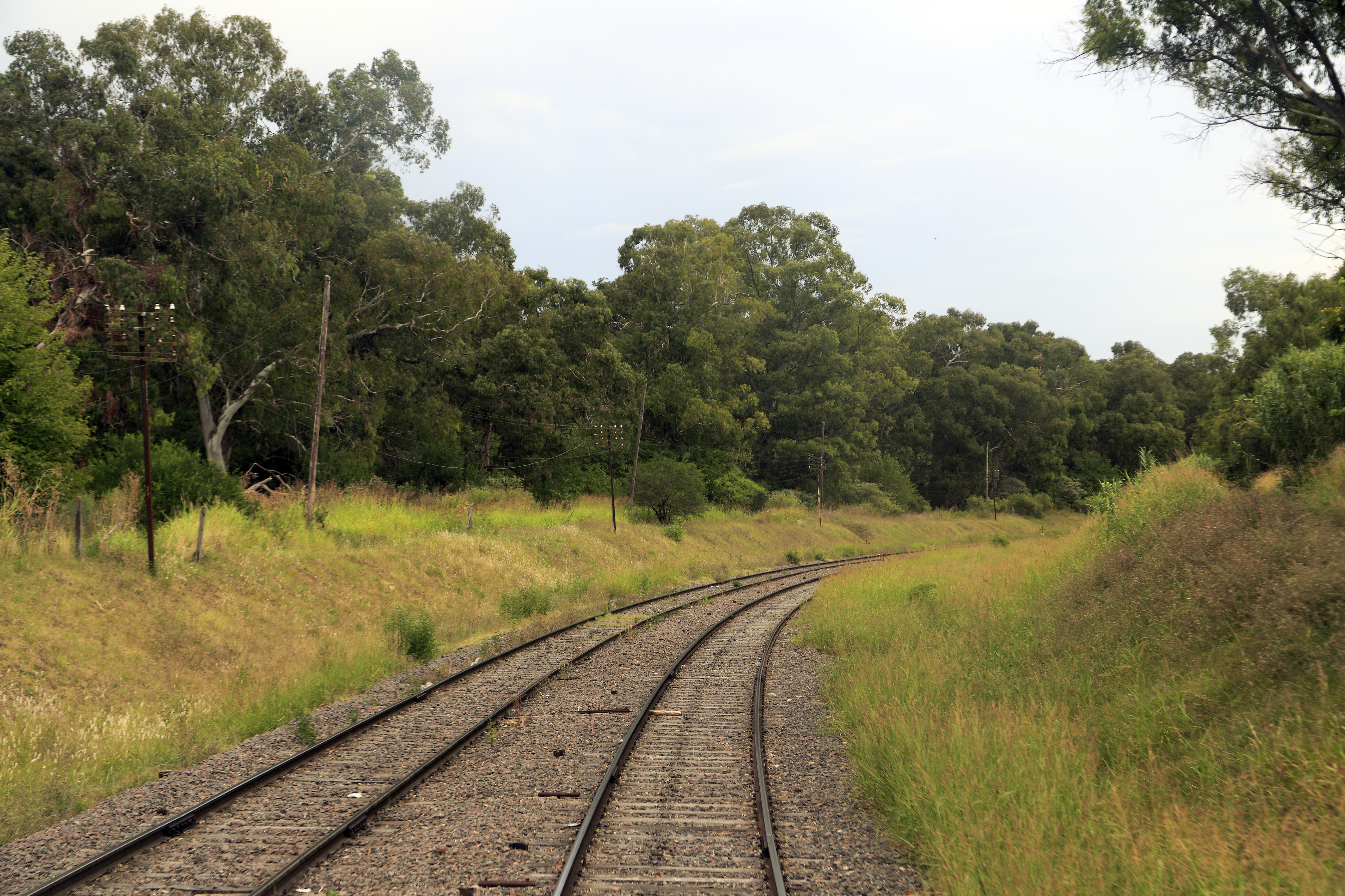 Das kleine Waldstück ist, vermutlich, weil der Transport zu unbequem ist, einer der wenigen müllfreien Abschnitte.Richtung Nordwesten